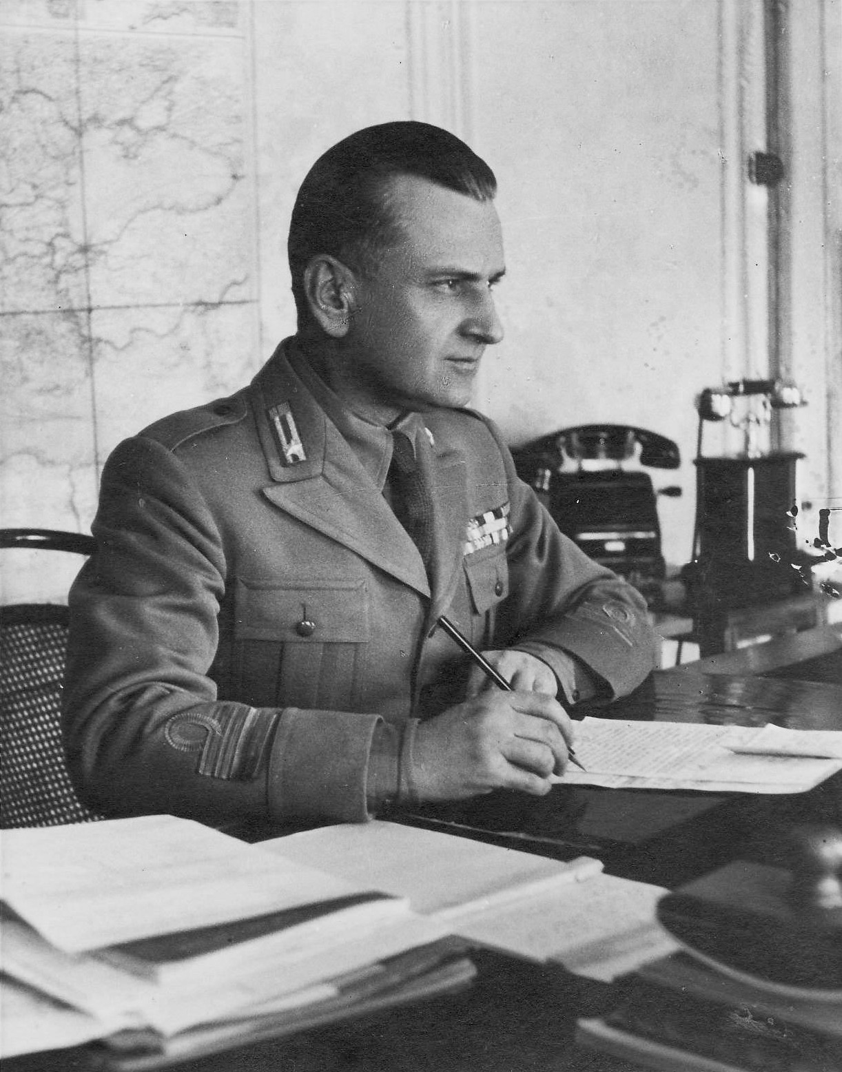 Il tenente colonnello Lusignani nel 1943